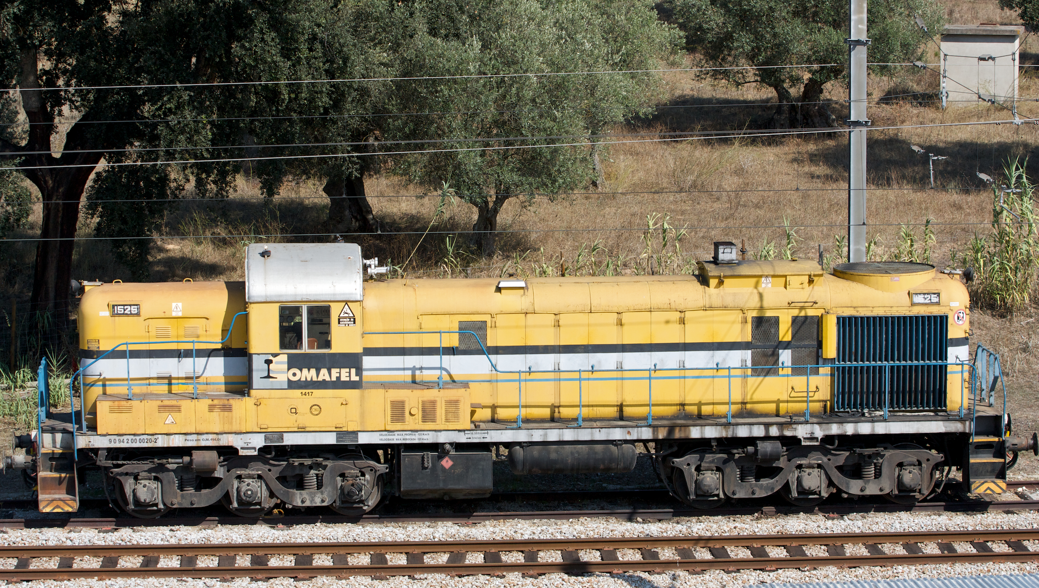 Local: Estação de Alcácer do Sal [Linha do Sul, PK 78] Data e hora: 13 de Outubro de 2010 [13h02] Material: Locomotiva 1525 [Alco] N.º UIC: 90 94 200 0020-2 P (Somafel 1417)